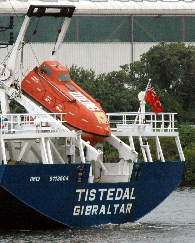 Freifallrettungsboot des Frachters Tistedal